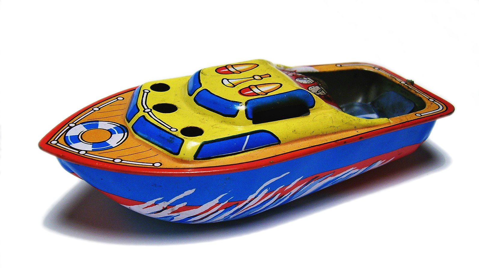 Bildbeschreibung: Knatterboot, Puff-Paff-Boot Quelle: selbst fotografiert Fotograf: Lokilech Datum: siehe Metadaten 23:09, 20. Feb 2006 Kolling 1593 x 893 (330869 Byte) (* Bildbeschreibung: Knatterboot, Puff-Paff-Boot * Quelle: selbst fotografiert * Fotograf: ~~~ * Datum: siehe Metadaten GFDL})